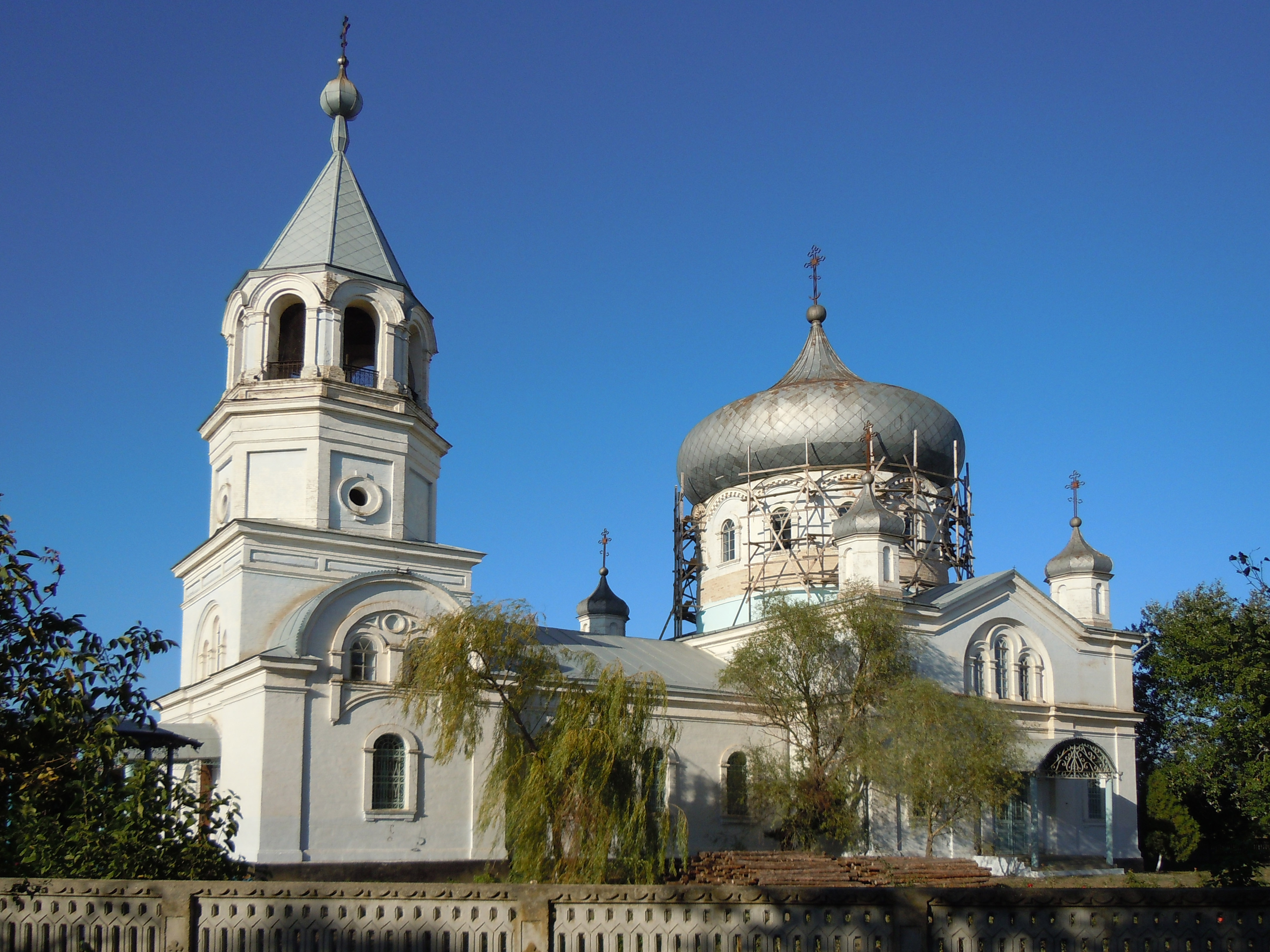 Церква Іоанна Богослова, с. Нерушай